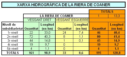 Taula de síntesi de les dades de la xarxa hidrogràfica de la conca de la Riera de Coaner.